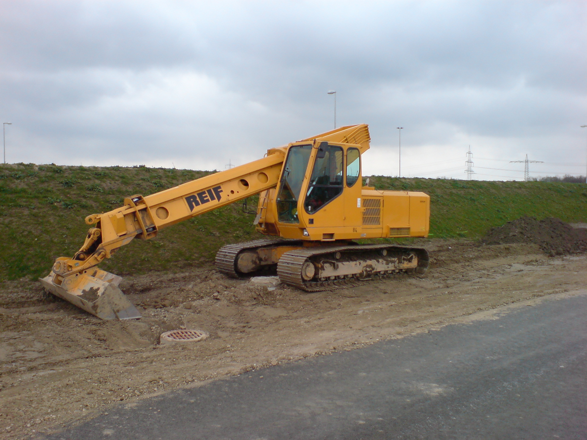 Teleskopbagger der Eisenwerke Kaiserslautern